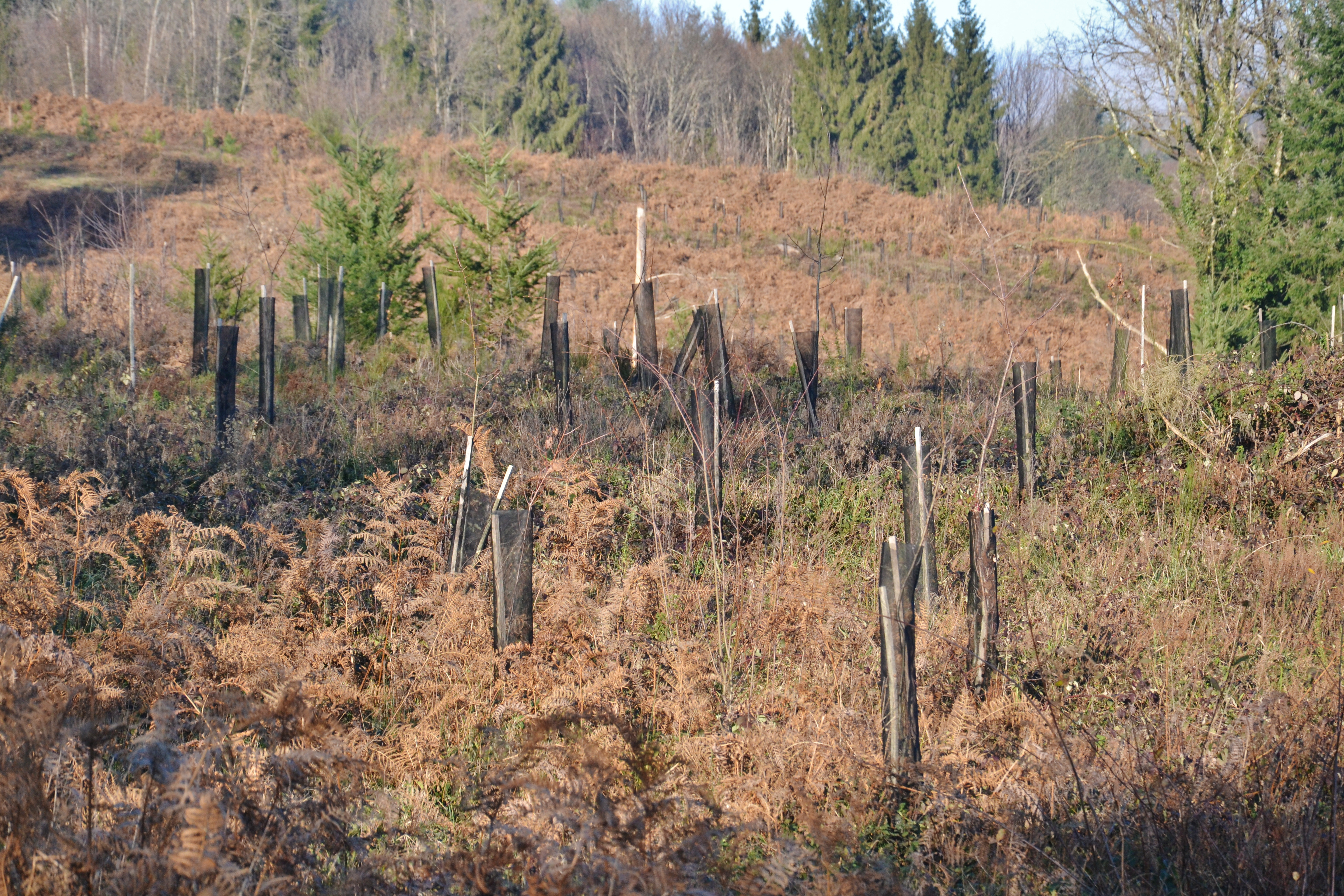 Arbres replantés après la tempête de 1999 dans les Monts de Blond (photo prise en janvier 2012)